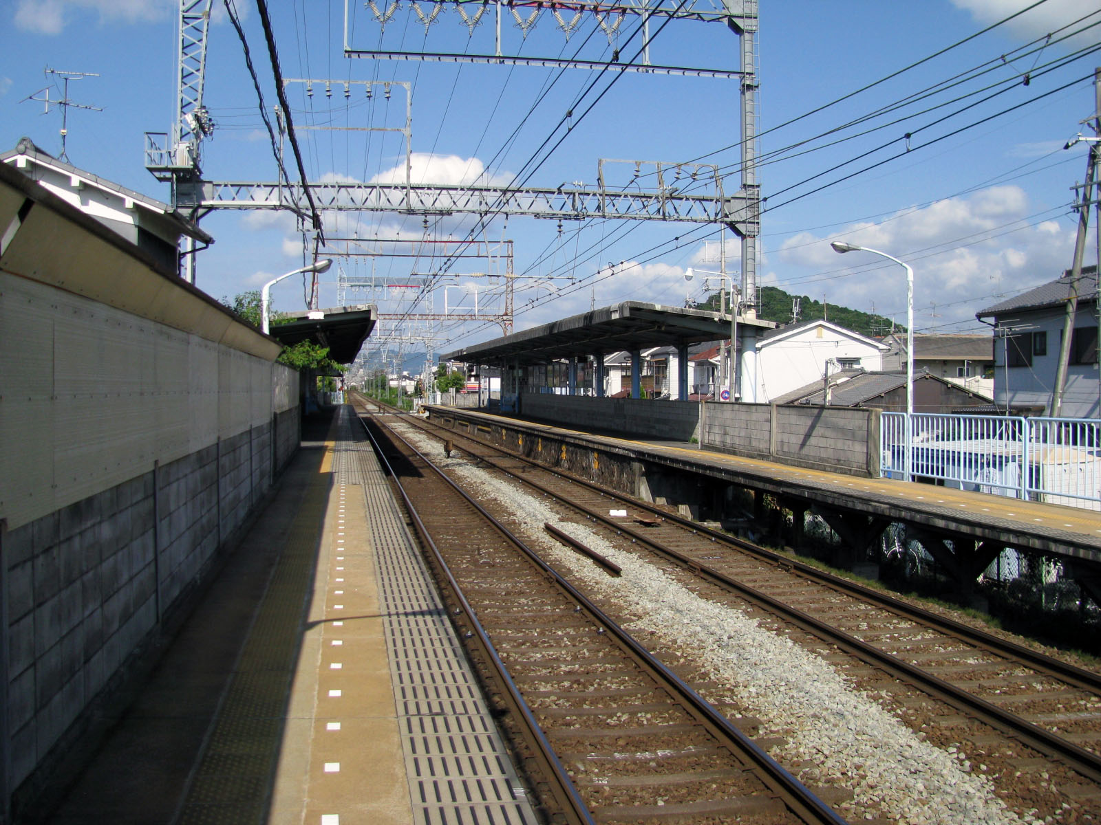 近鉄線耳成駅